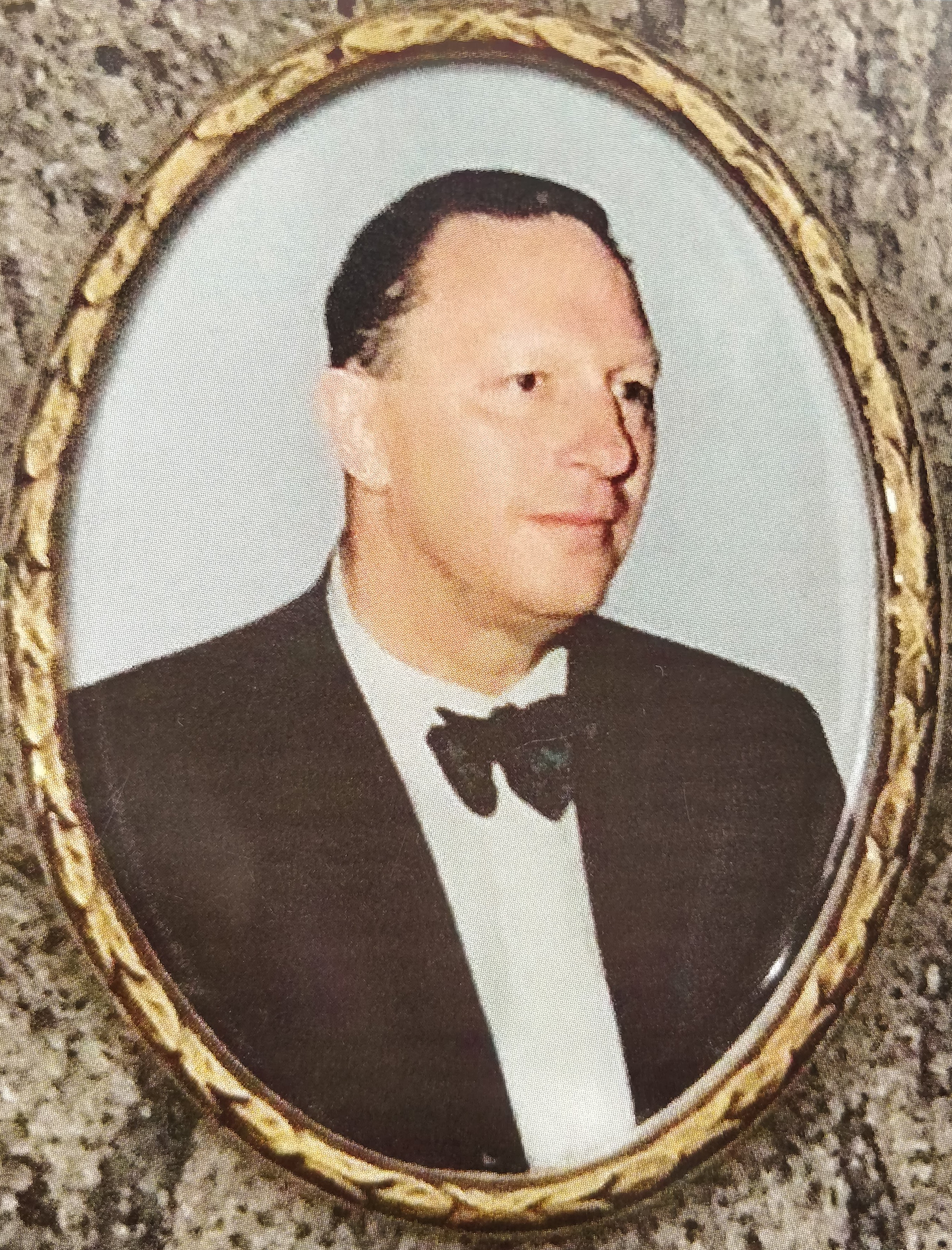 Foto welches auf Wilhelm Kurzes Beerdigung verteilt wurde